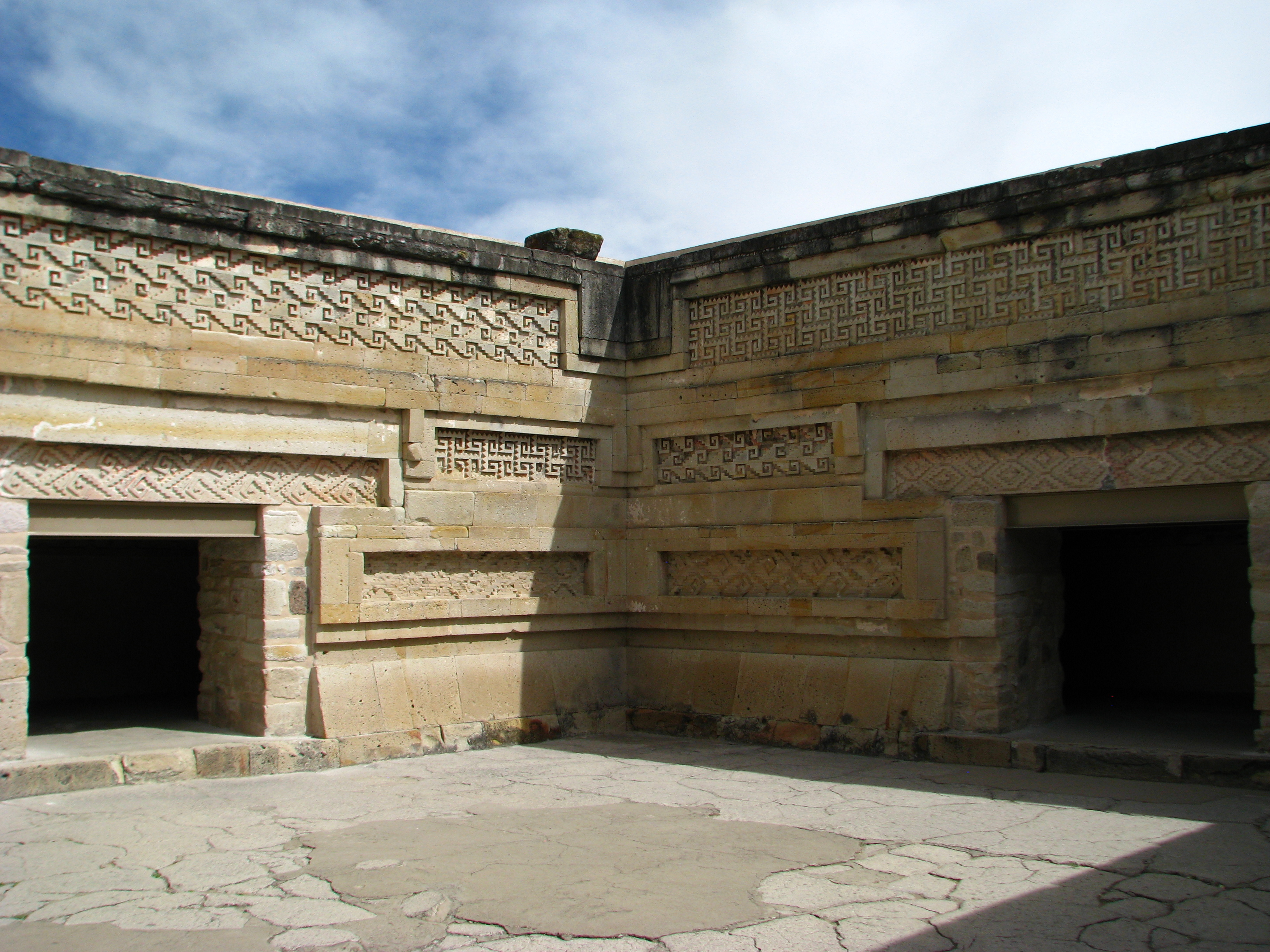 Zona Arqueológica Mitla